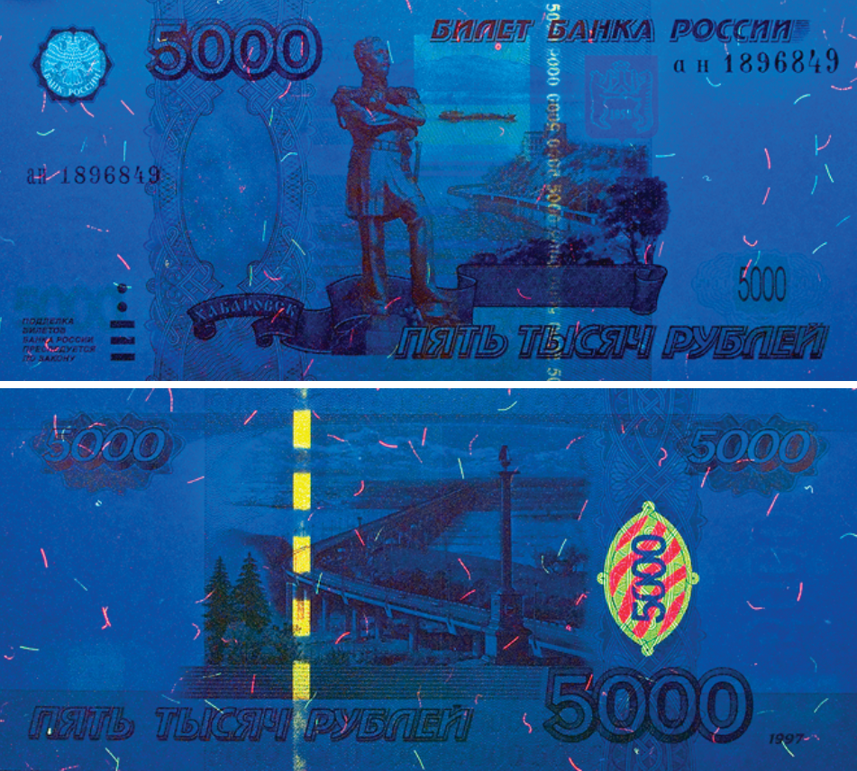 Билет Банка России в 5000 рублей образца 1997 года в ультрафиолете